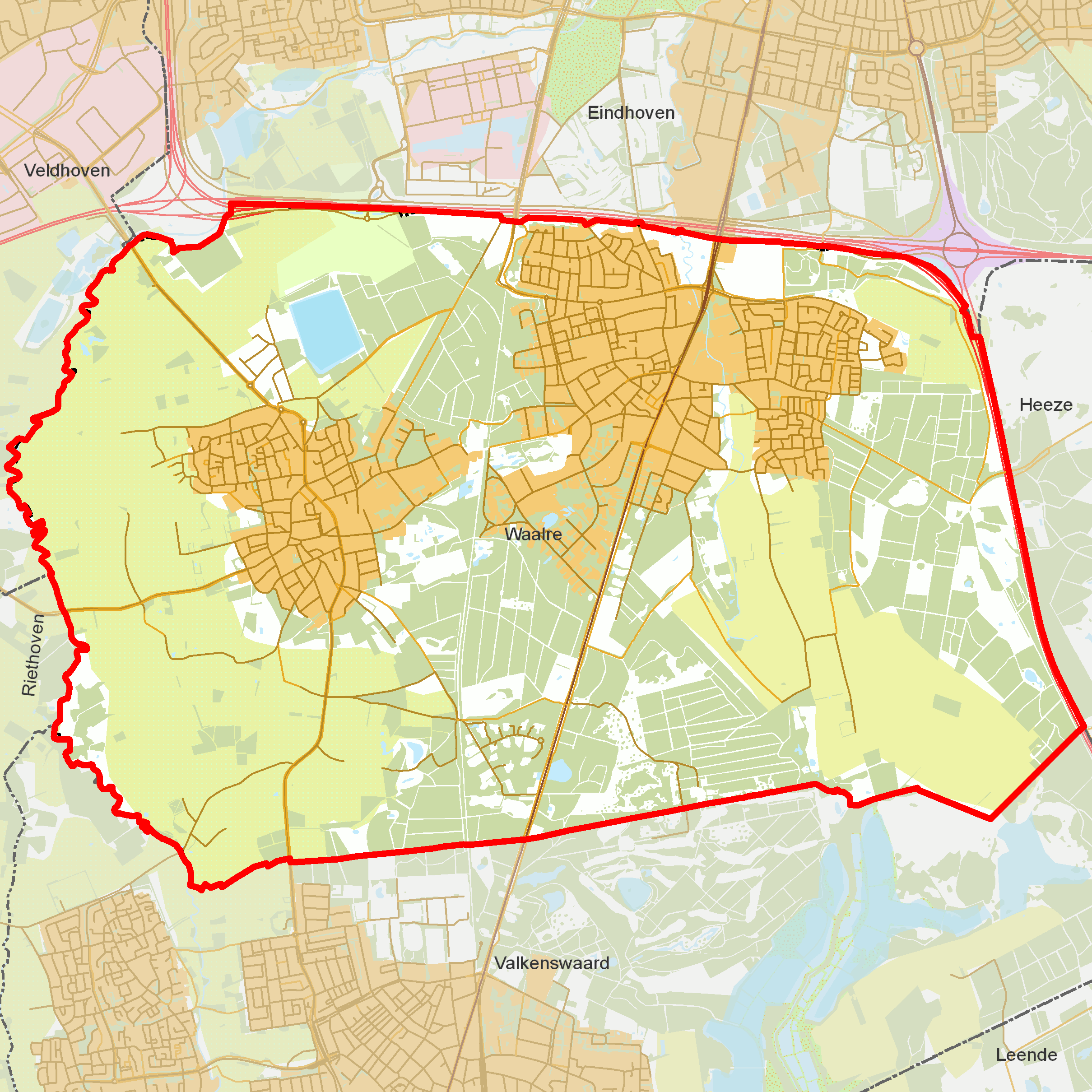 BAG woonplaatsen - Gemeente Waalre.png